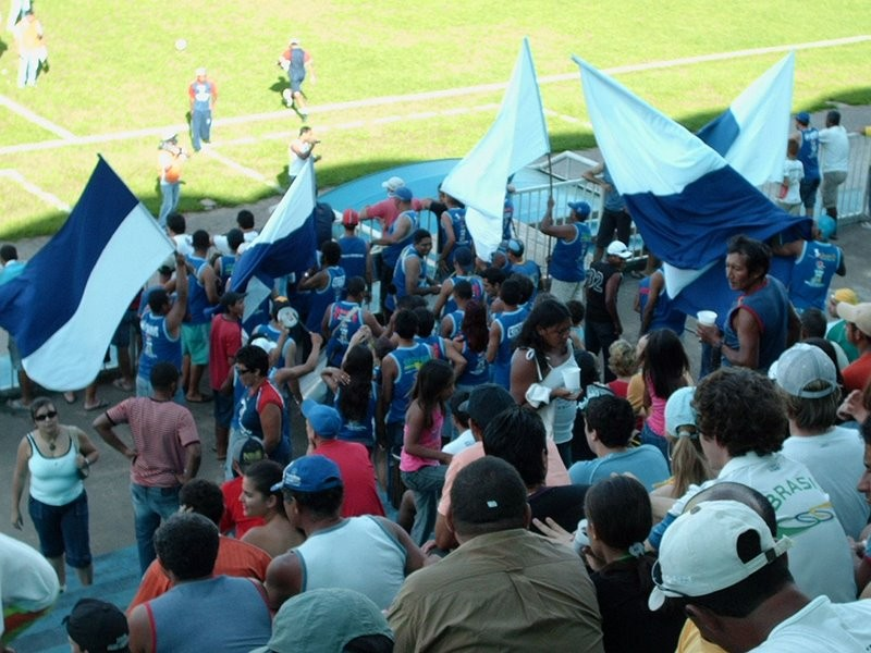 Torcida Organizada Mancha Azul: a maior torcida organizada de RondÃ´nia. Sempre presente nos jogos do Ji-ParanÃ¡ Futebol Clube.